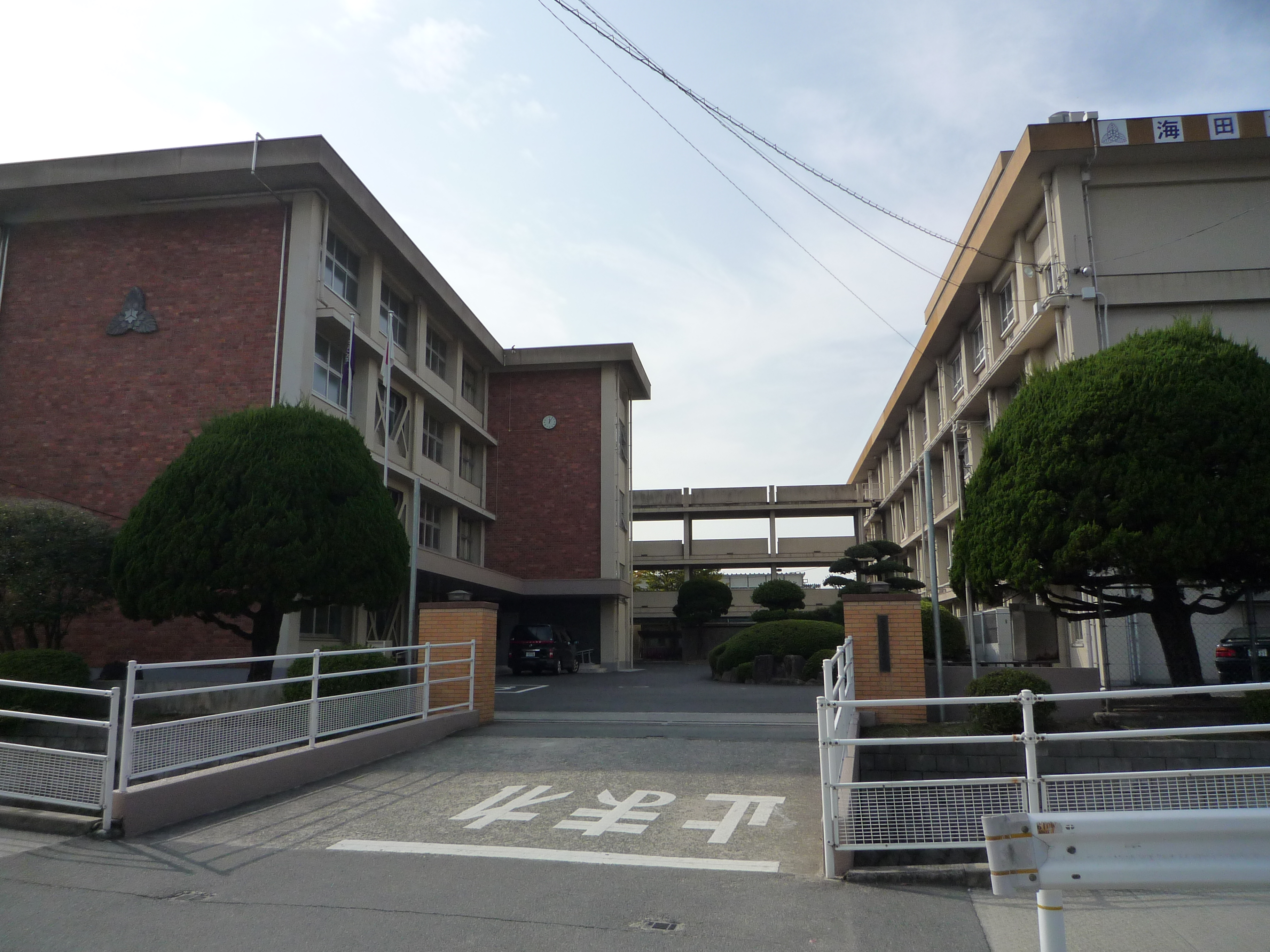 広島県立海田高等学校